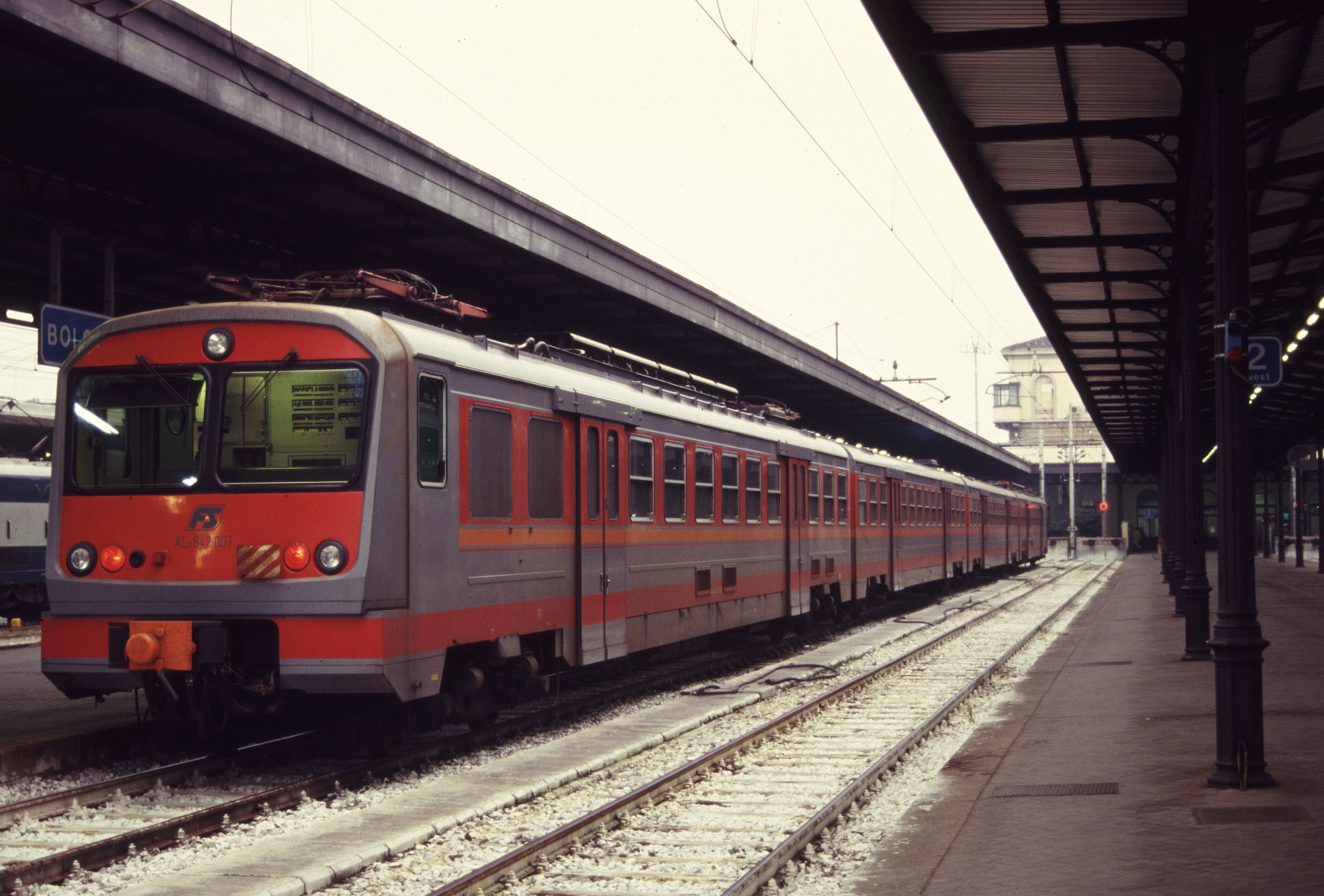 Elettromotrice FS Ale 642 a Bologna Centrale, 1990, autore Sandro Baldi, Bologna, Italia